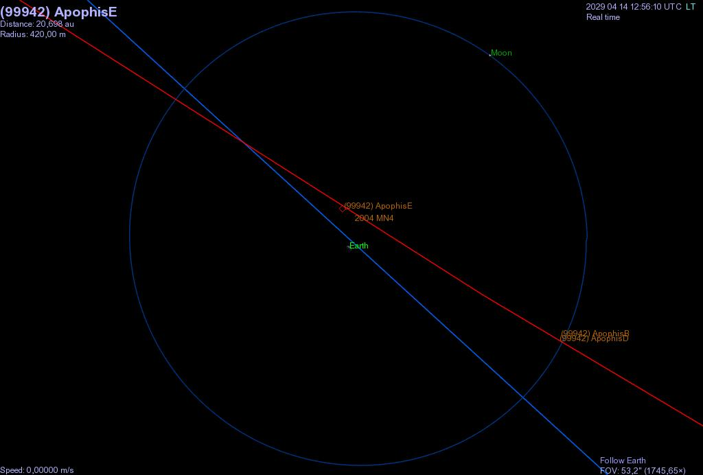 Orbita del asteroide Apophis en su encuentro con La Tierra 14 abr 2029 Generada con el programa Celestia (licencia GNU)